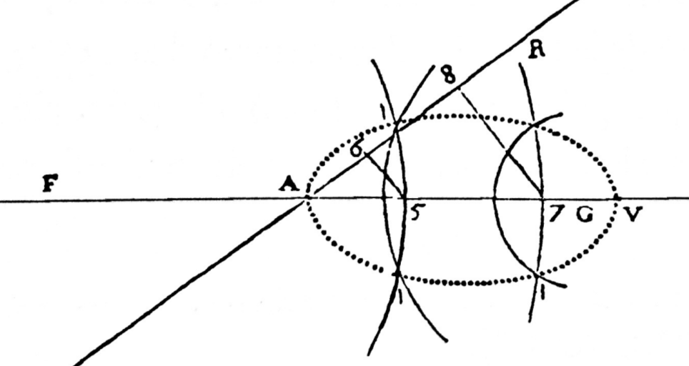 Oval de primera classe a la Geometria de Descartes